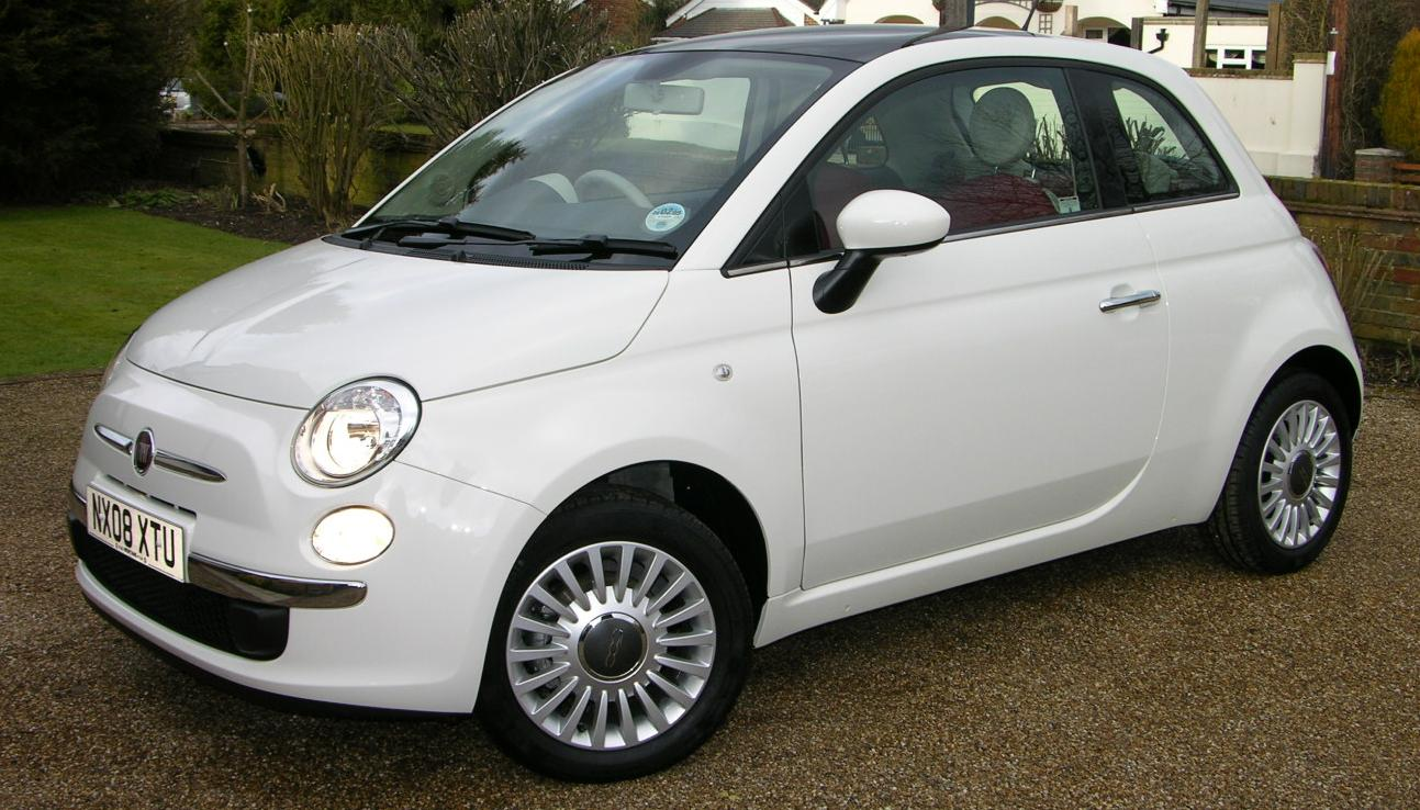 2008 FIAT 500 1.4 Lounge.